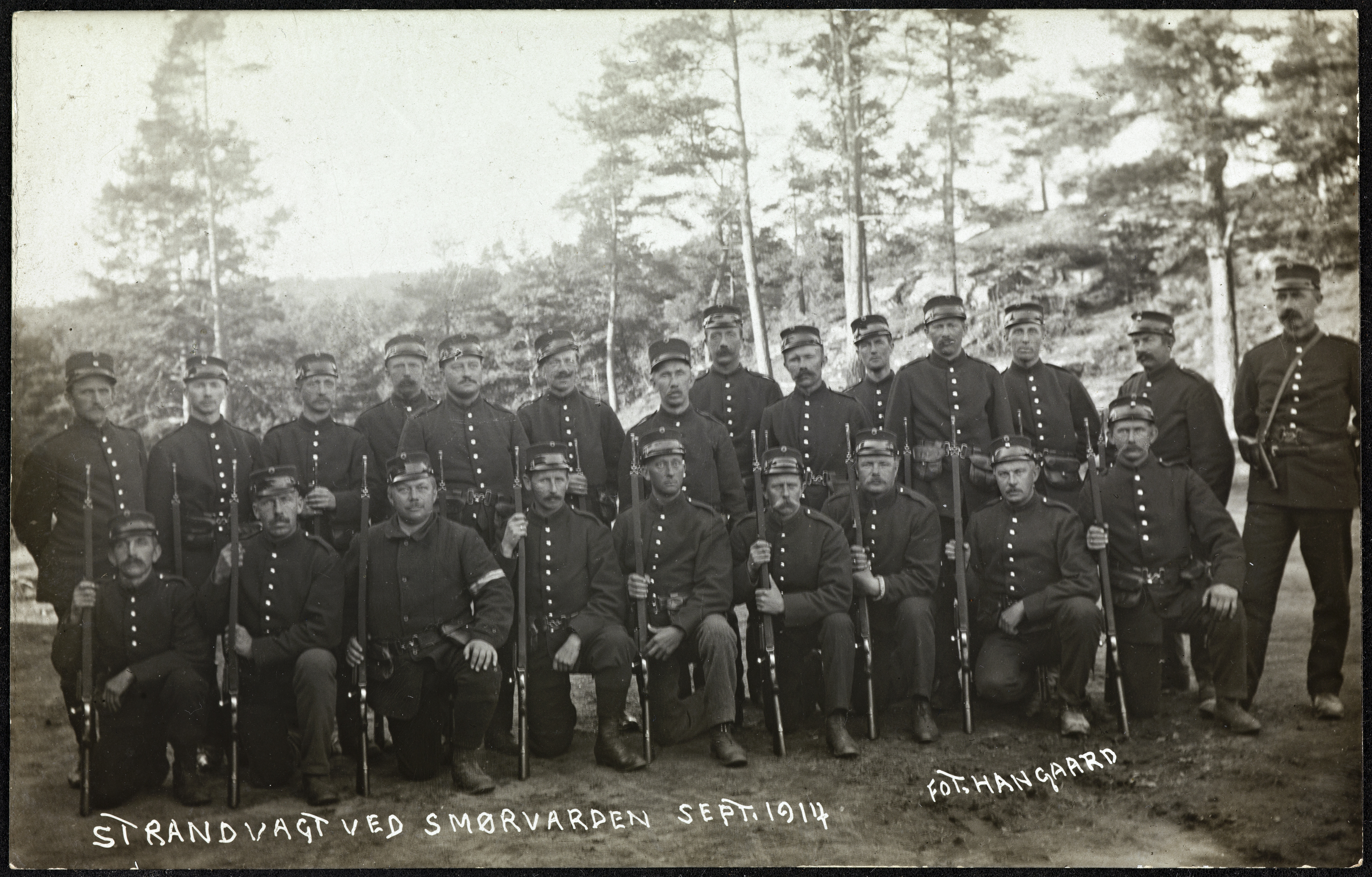 Dato / Date: september 1914 Sted / Place: Vest-Agder, Kristiansand, Smørvarden Fotograf / Photographer: Ole Hangaard (1854-1936) Utgiver / Publisher: Hangaard Digital kopi av original / Digital copy of original: s/h papirpositiv, sølvgelatin Eier / Owner Institution: Nasjonalbiblioteket / National Library of Norway Lenke / Link: Bildesignatur / Image Number: blds_06889